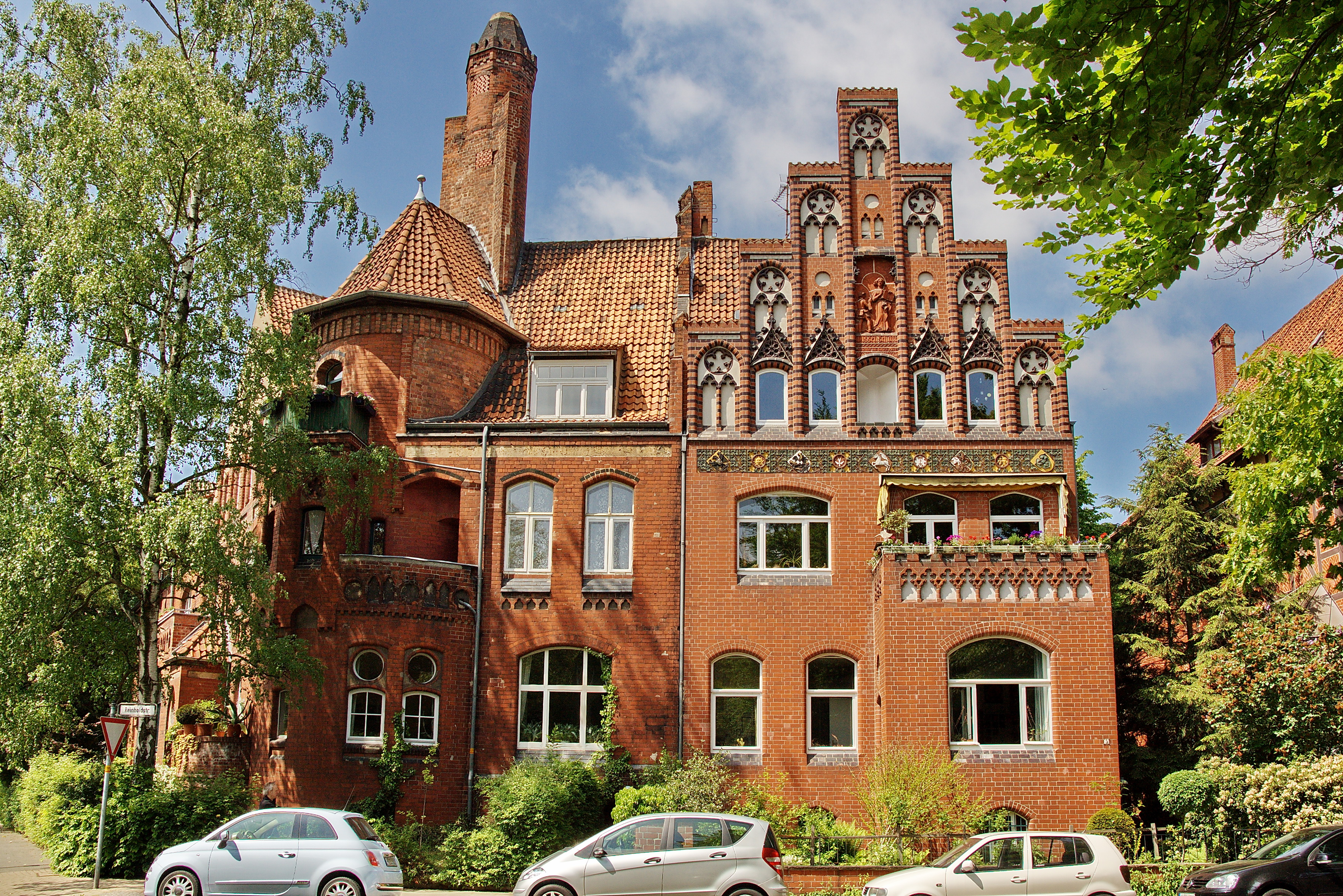 Baudenkmal Herrenhäuser Kirchweg 11 in der Nordstadt Hannover, Niedersachsen, Deutschland